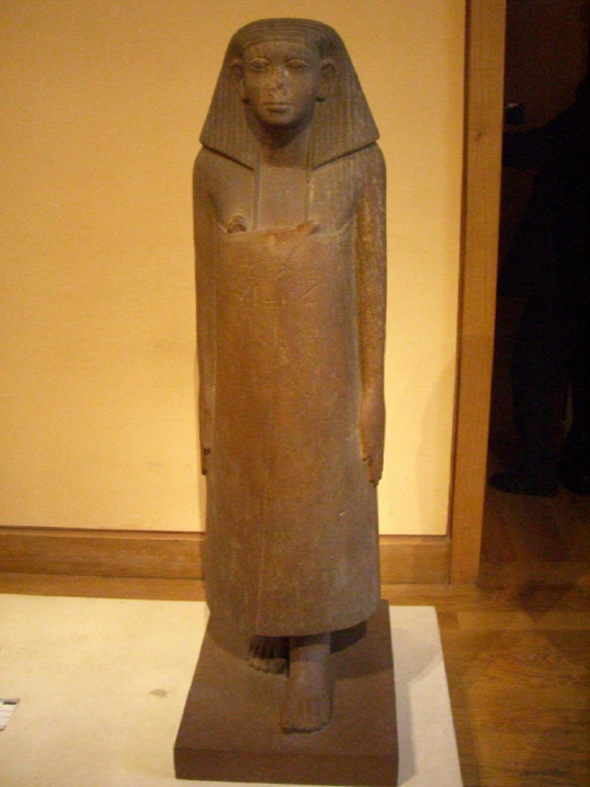 Casio EX-S500